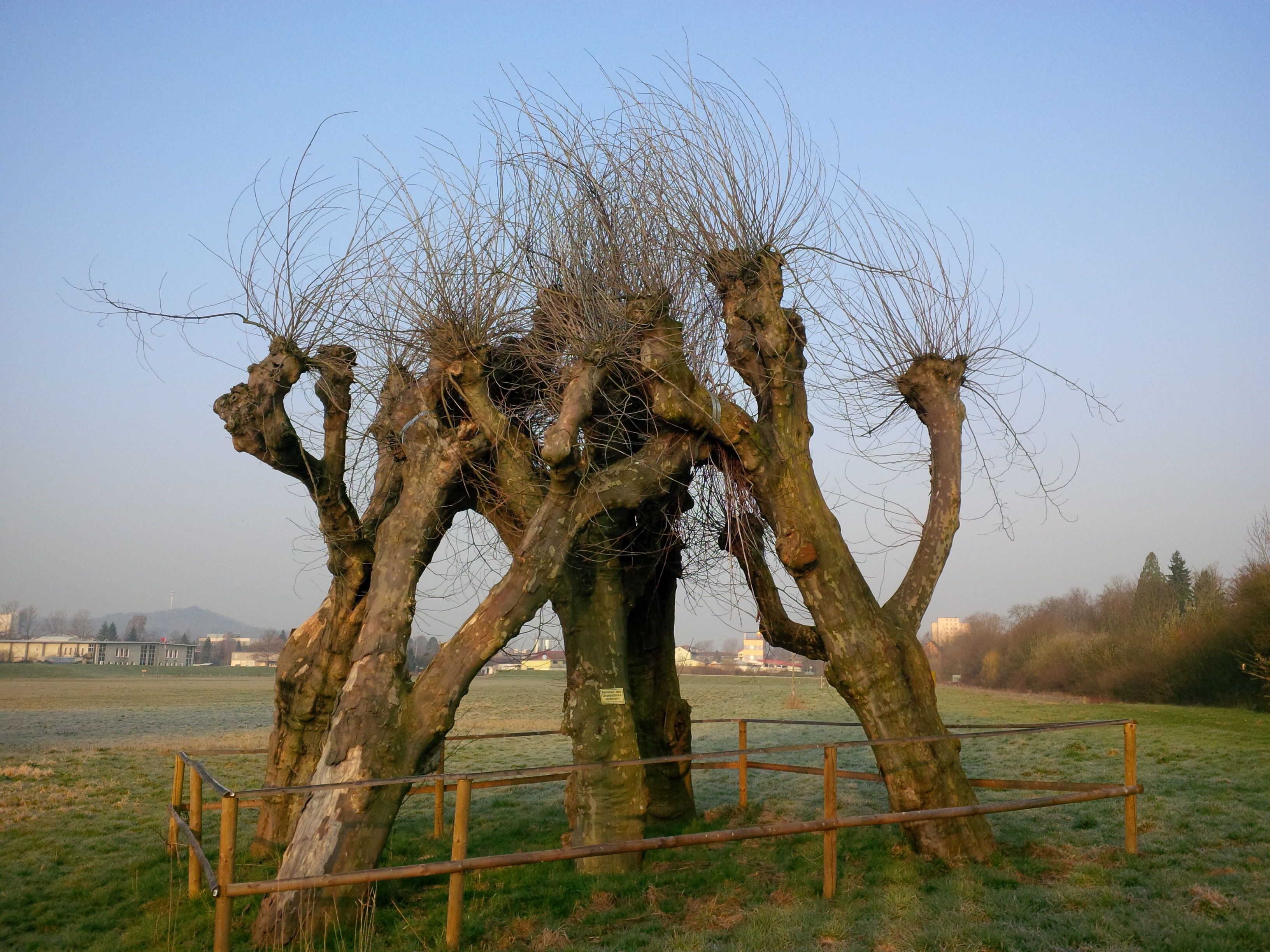 Totholz-Pyramide bei Sinsheim